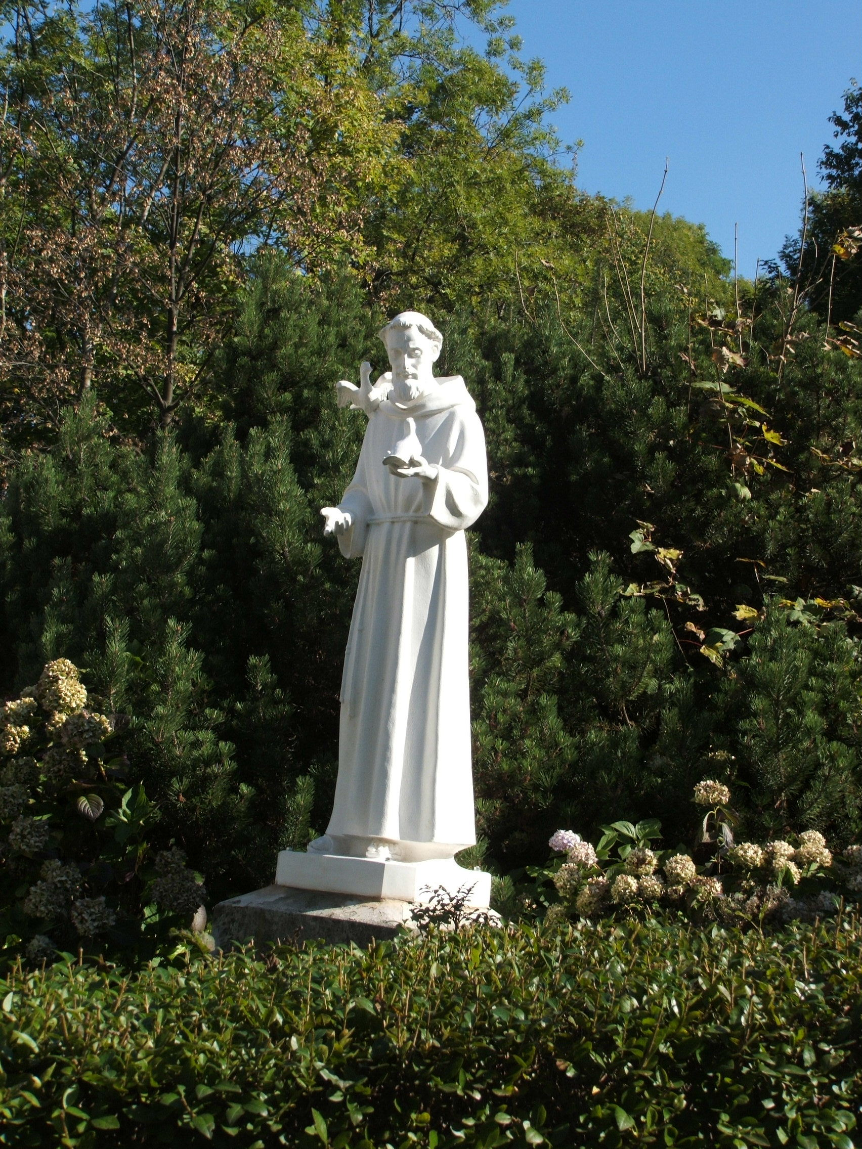 Santuario di Banchette a Bioglio (provincia di Biella, Piemonte, Italia) 11